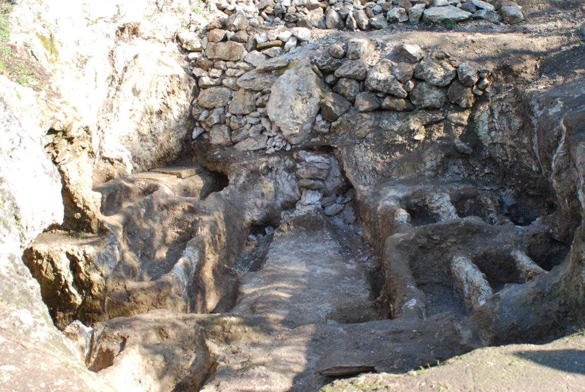 Necropoli di Monte Pucci This is a photo of a monument which is part of cultural heritage of Italy.